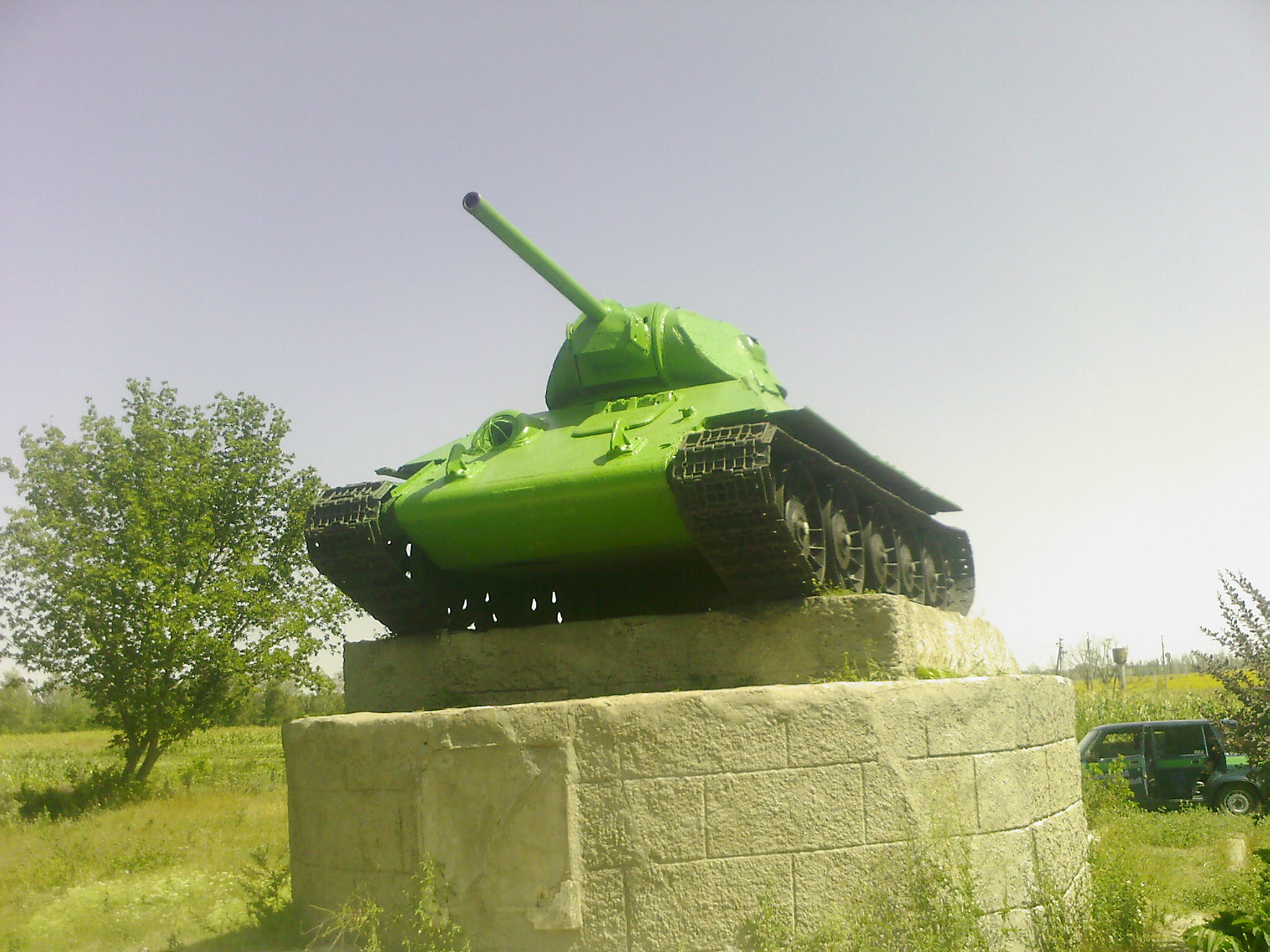 Памятник Т-34